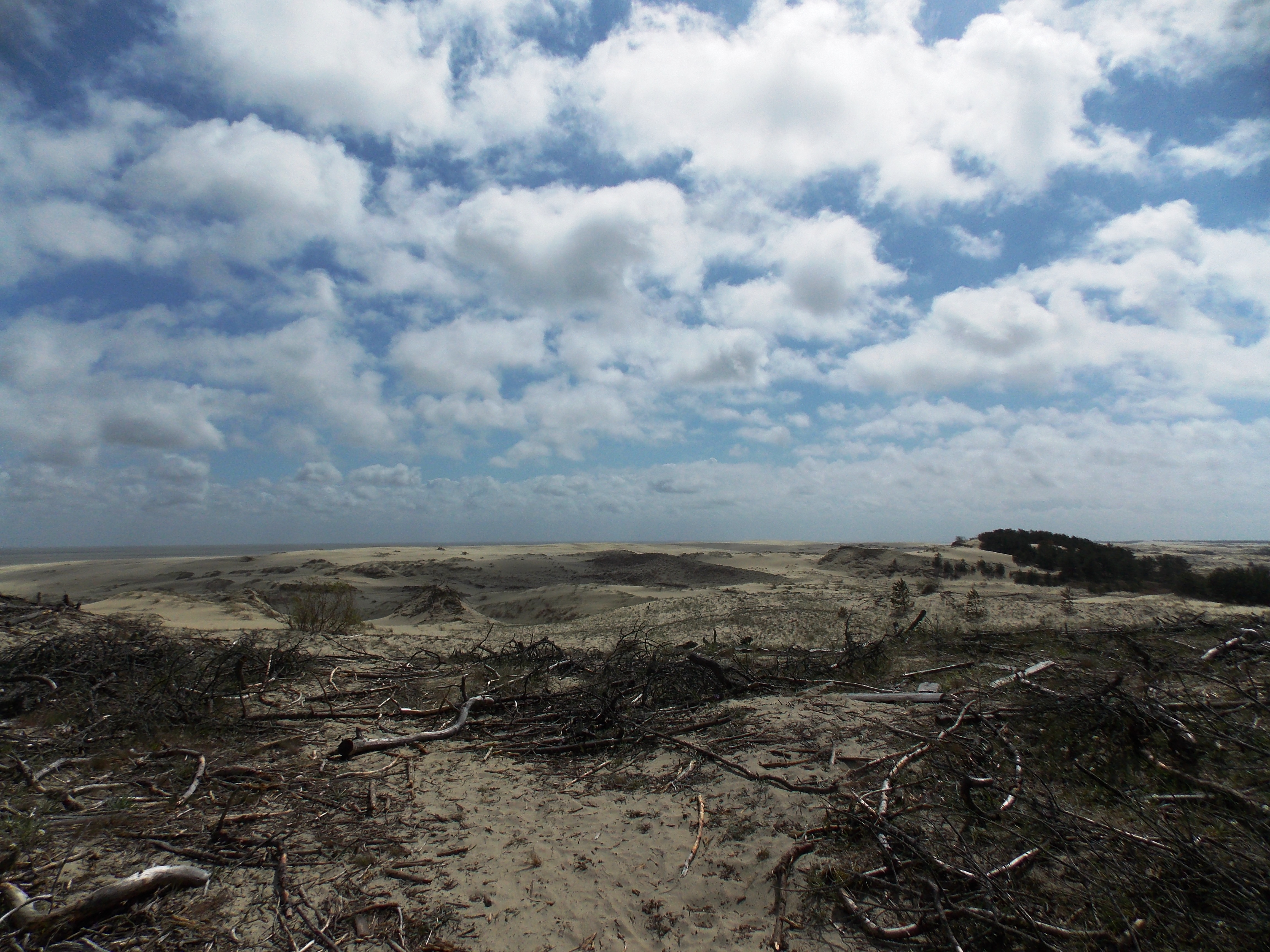 Музей природы национального парка Куршская Коса, Зеленоградский район This image is related to the protected area of Russia number 3930042